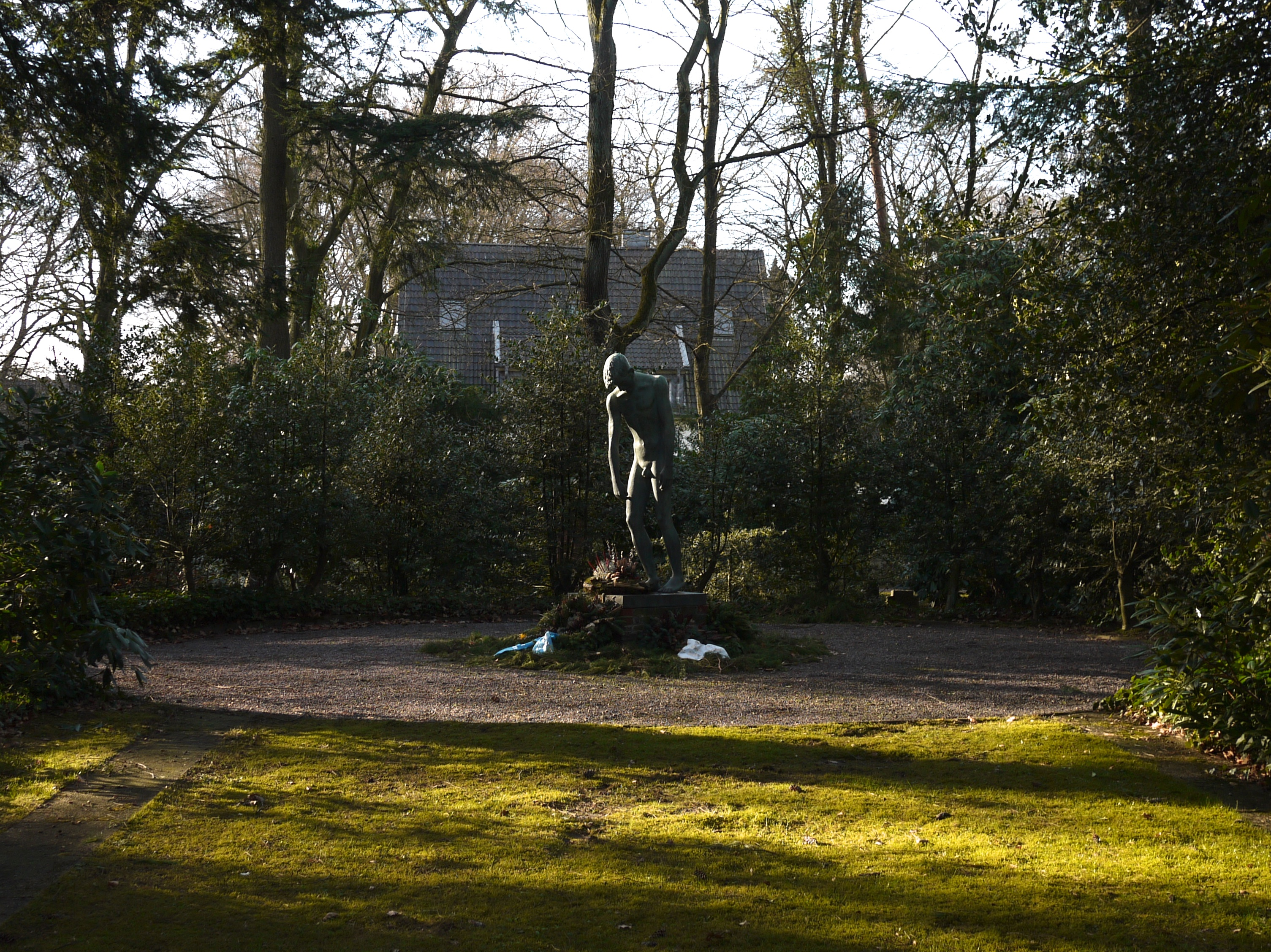 "Zusammenbrechender" von Hermann Lickfeld, auf dem Ehrenfriedhof in Mülheim an der Ruhr This is a photograph of an architectural monument.